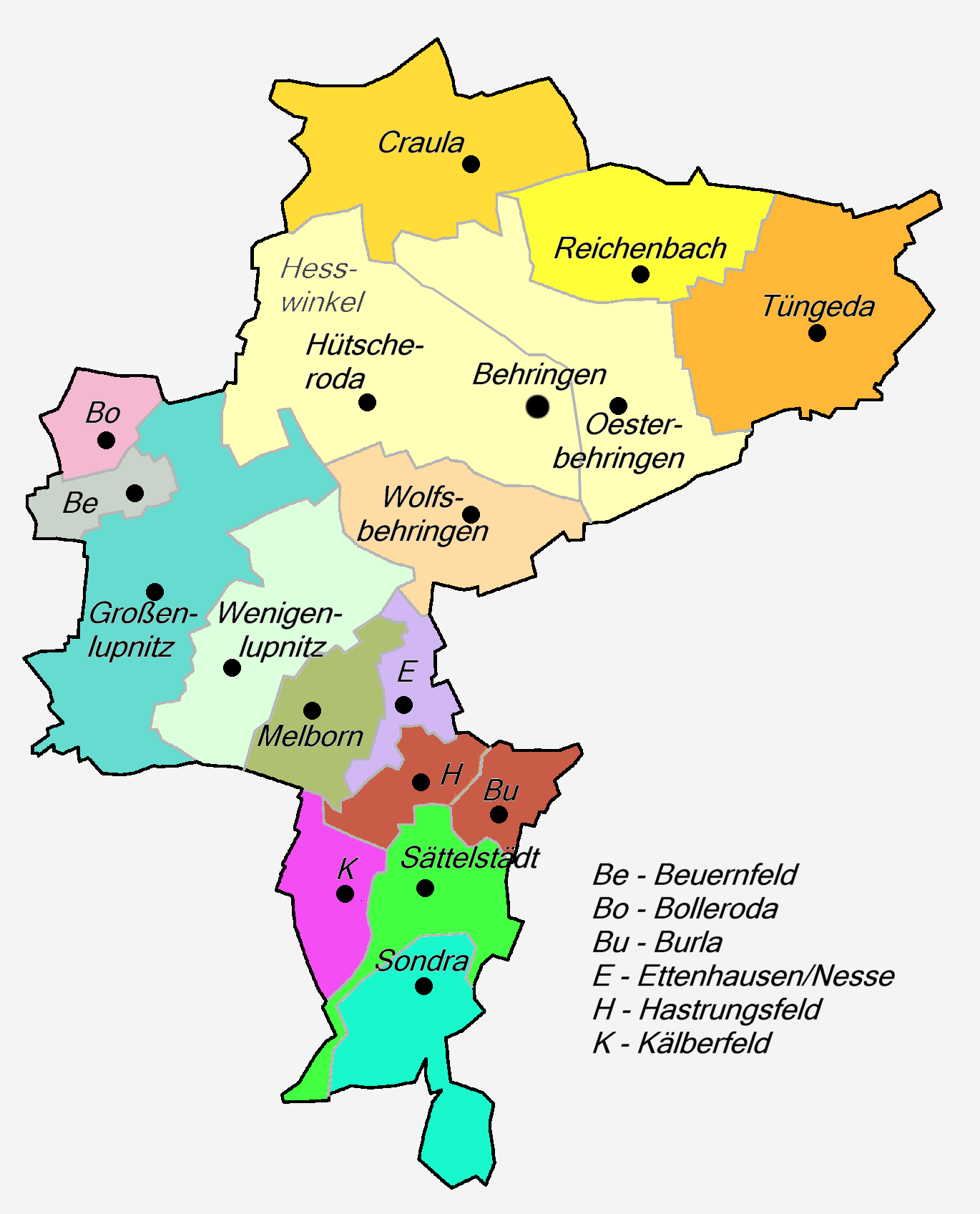 Kartensatz zur Gemeindeentwicklung